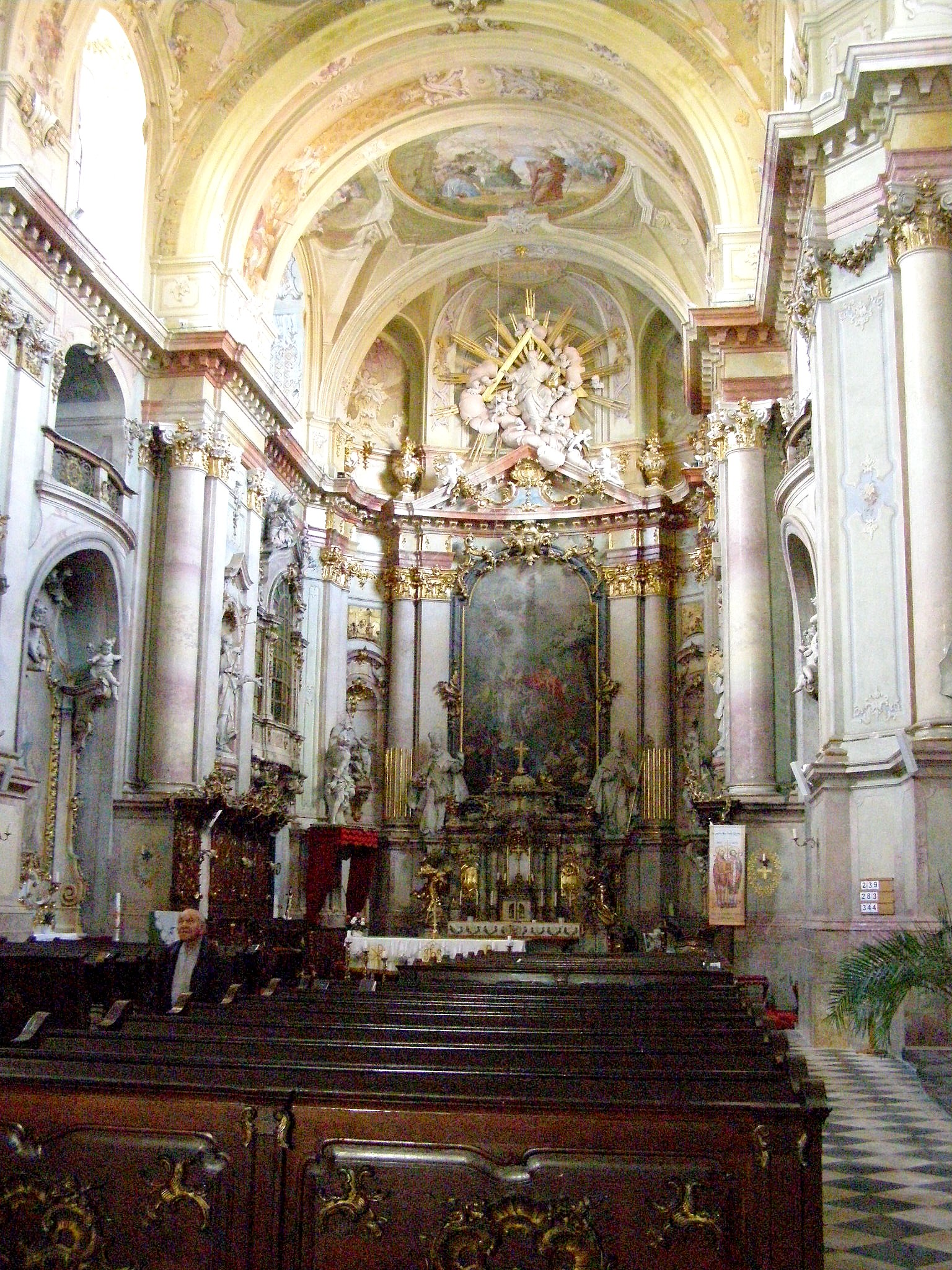 Pohľad do interiéru kláštorného Kostola svätého Jána Krstiteľa v jasovskom premonštrátskom kláštore